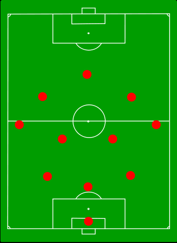 Il 3-4-3, modulo tipico delle squadre di Zaccheroni.